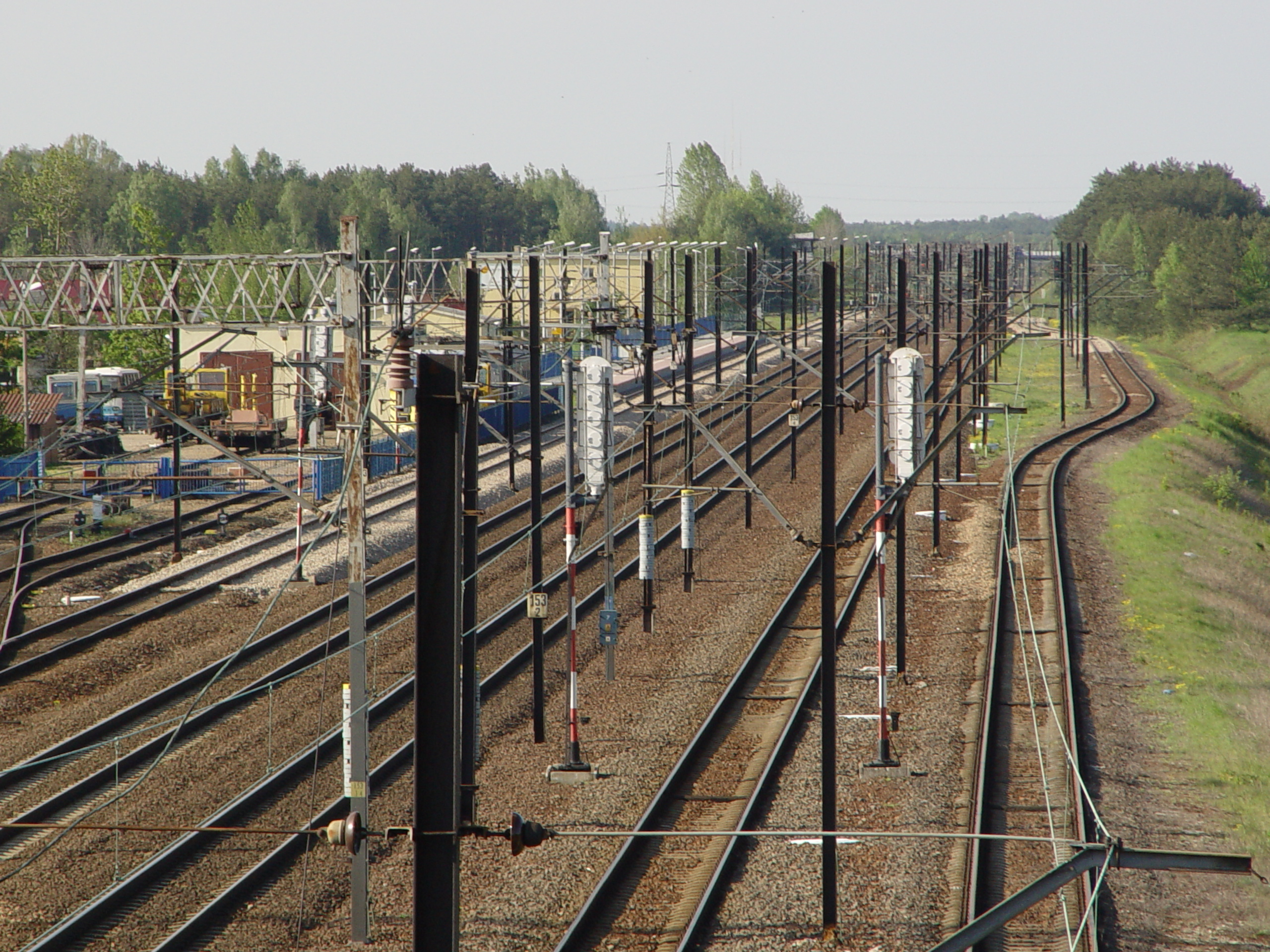 Stacja Włoszczowa Północ